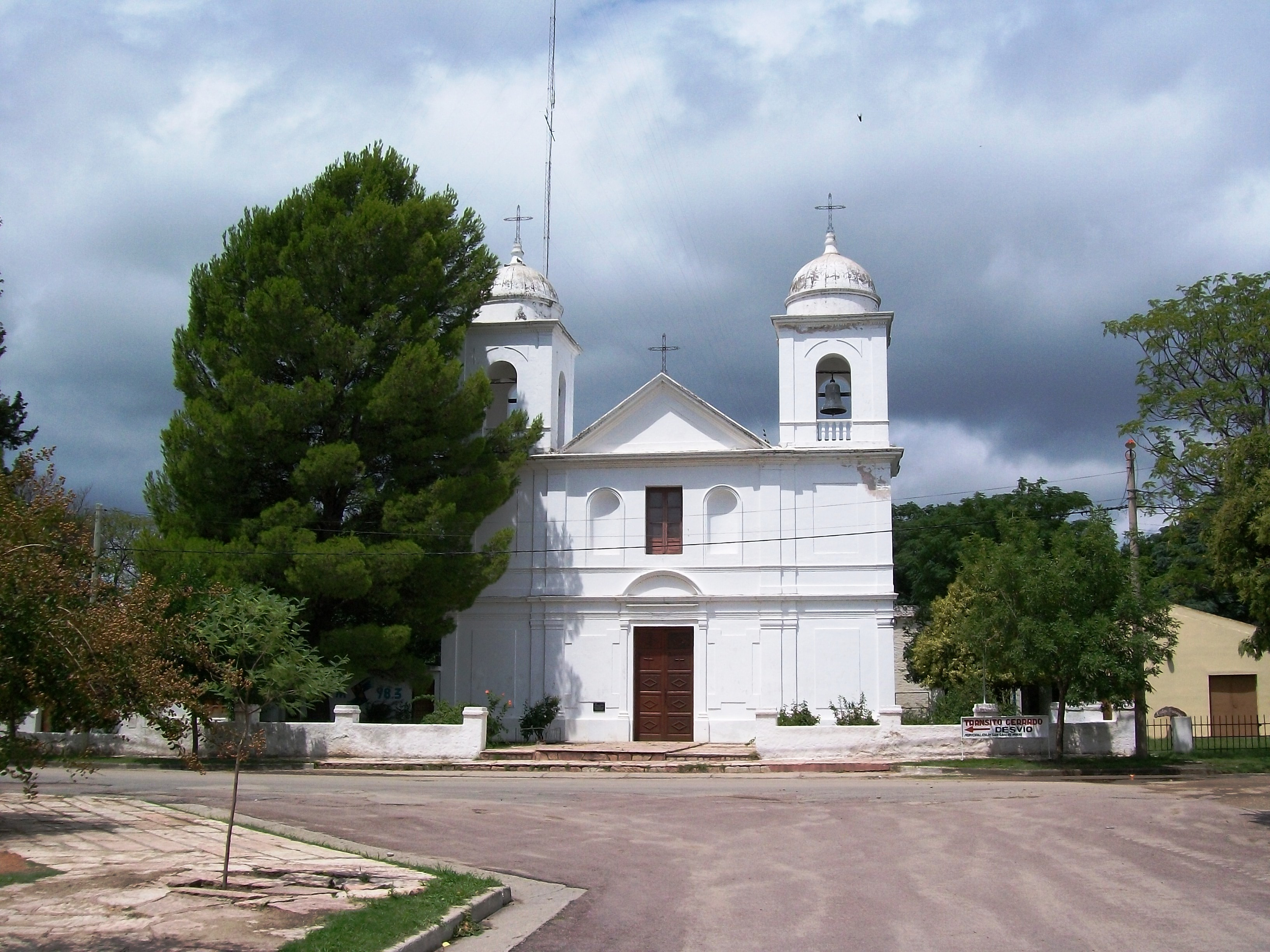 San Carlos Minas, (iglesia), Traslasierra, Córdoba, Argentina